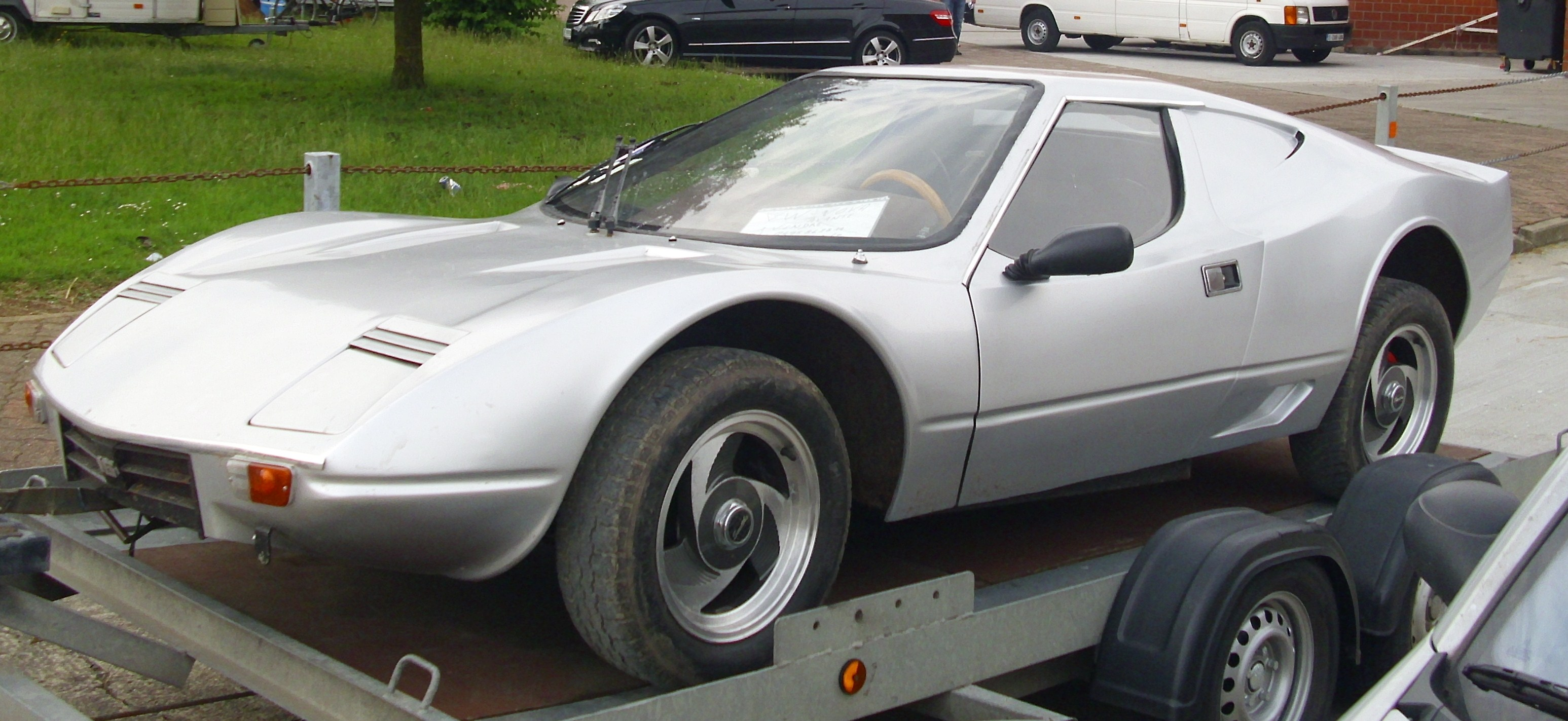 Avante Coupé